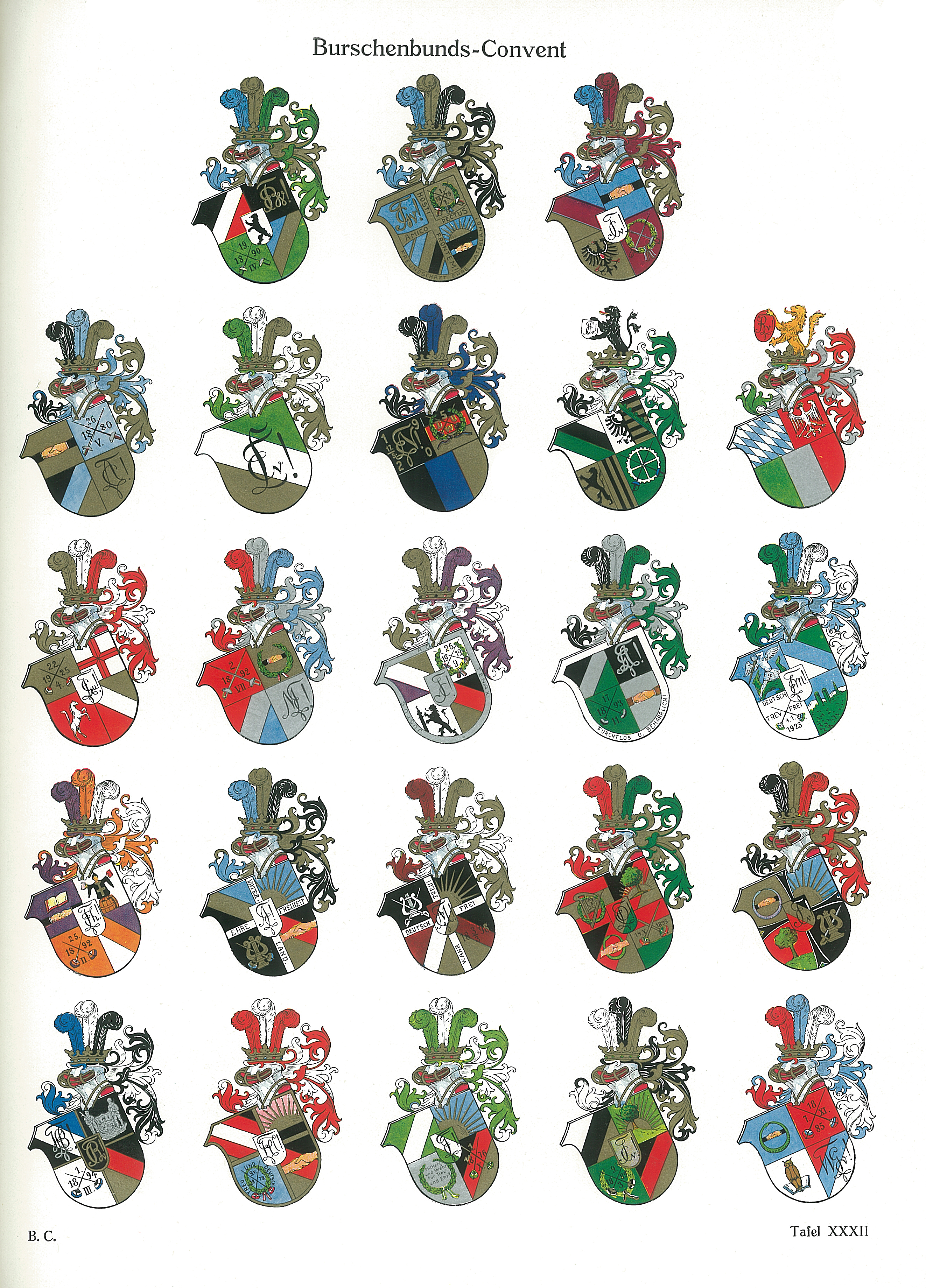 Studentenwappen des Burschenbunds-Convents.